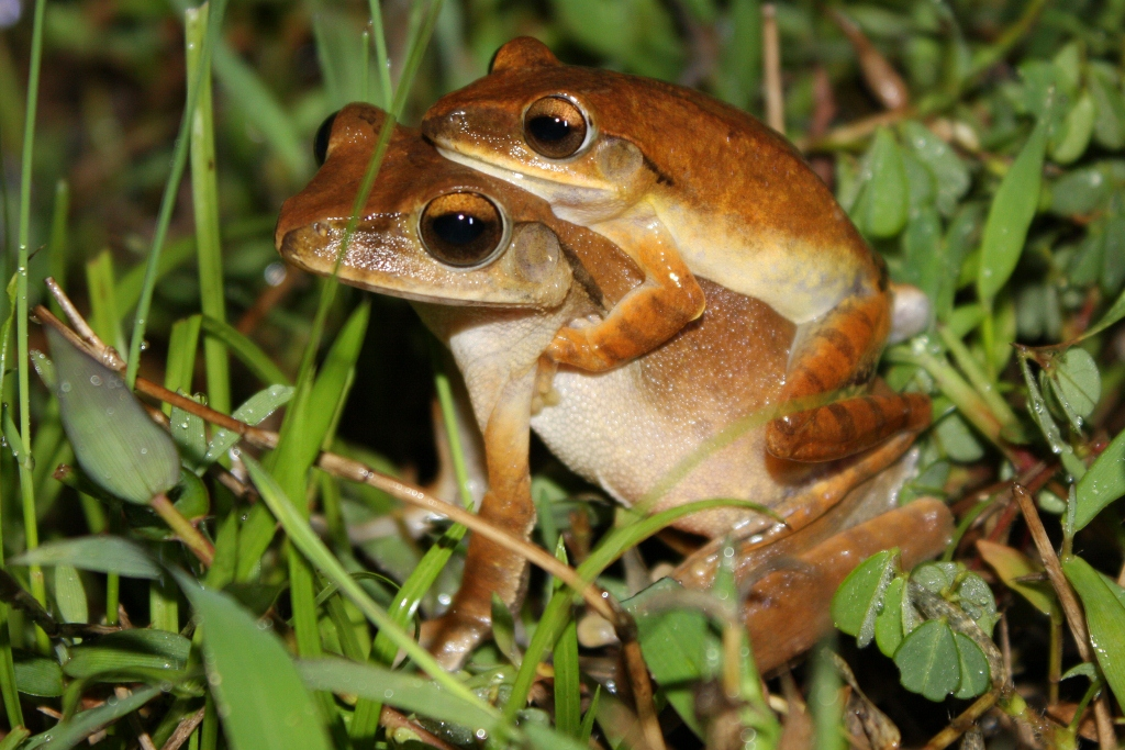 Taken in Wu Kau Tang.